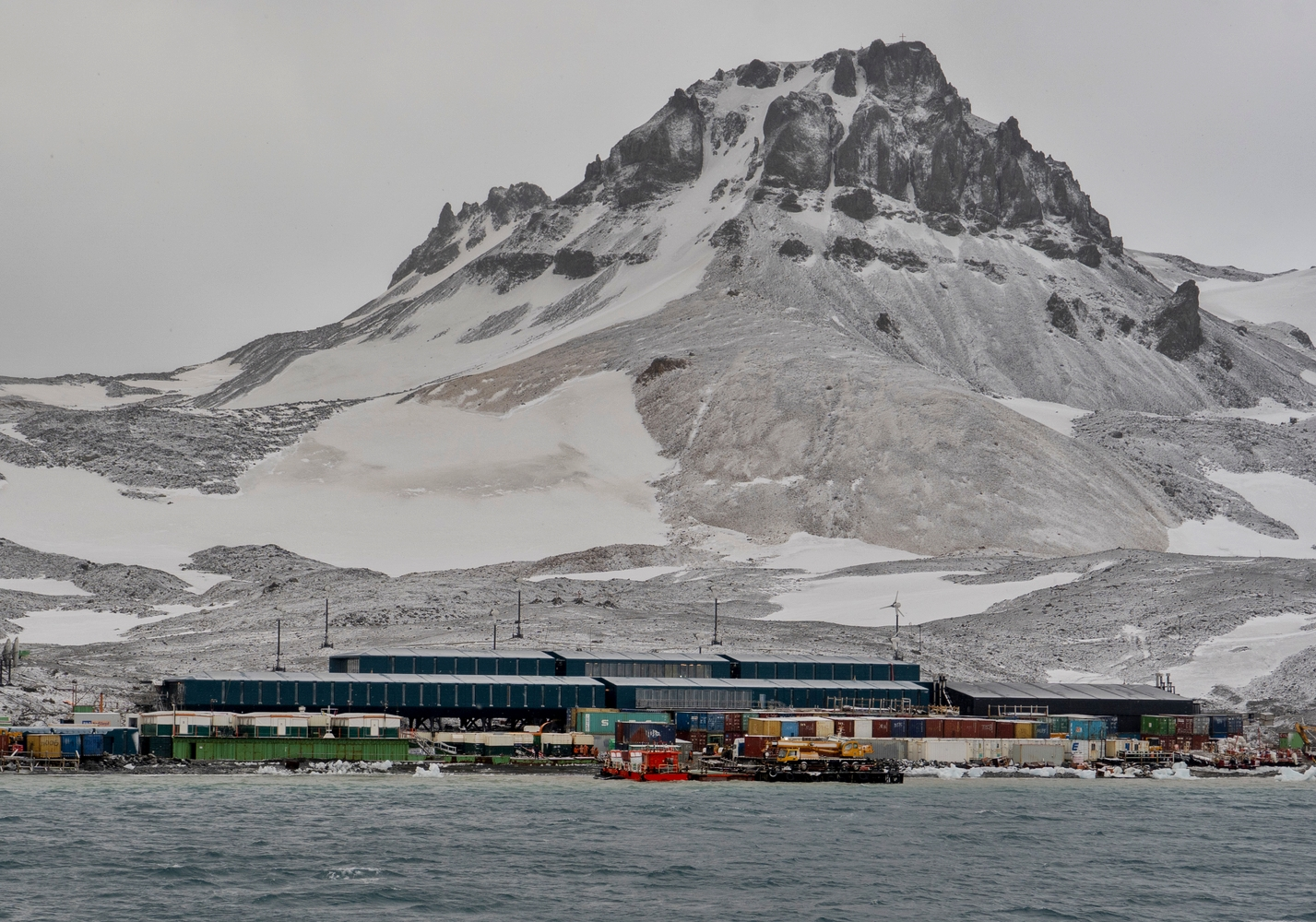 PROANTAR - Missão Programa Antártico XXXVII à estação Antartica Comandante Ferraz 11/03/2019 - Uma parceria entre Ministério da Ciência, Tecnologia, Inovações e Comunicações(MCTIC), Marinha do Brasil e Operadora Oi.